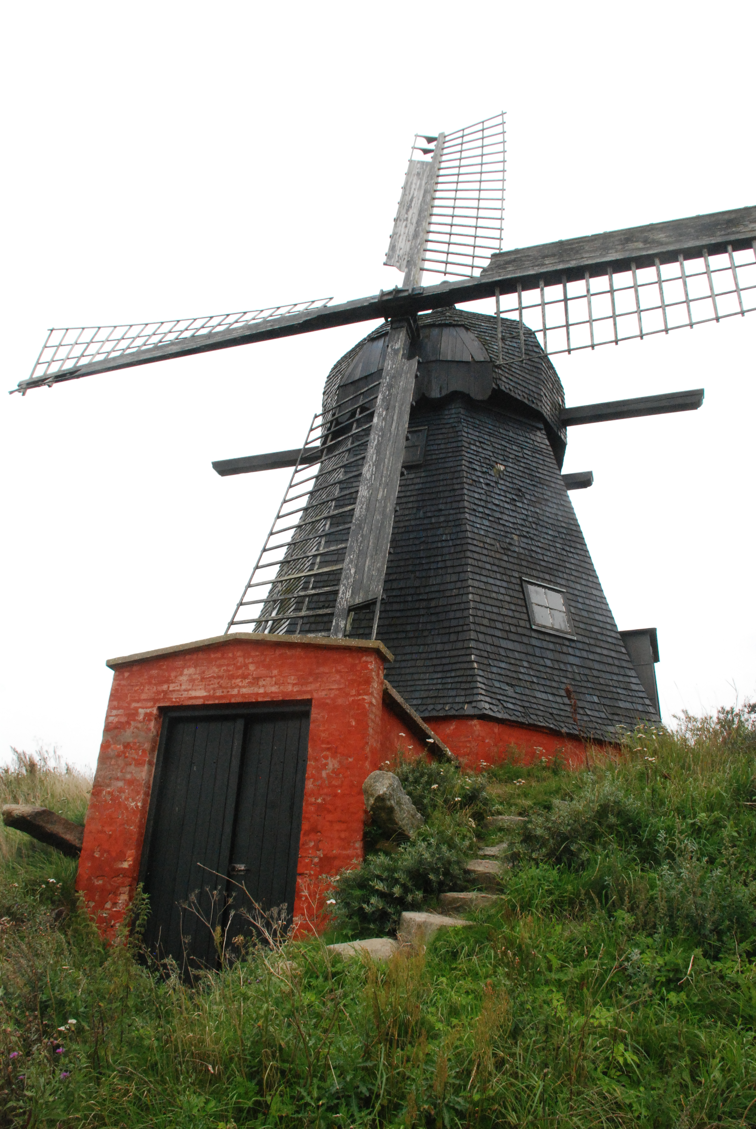 Denmark